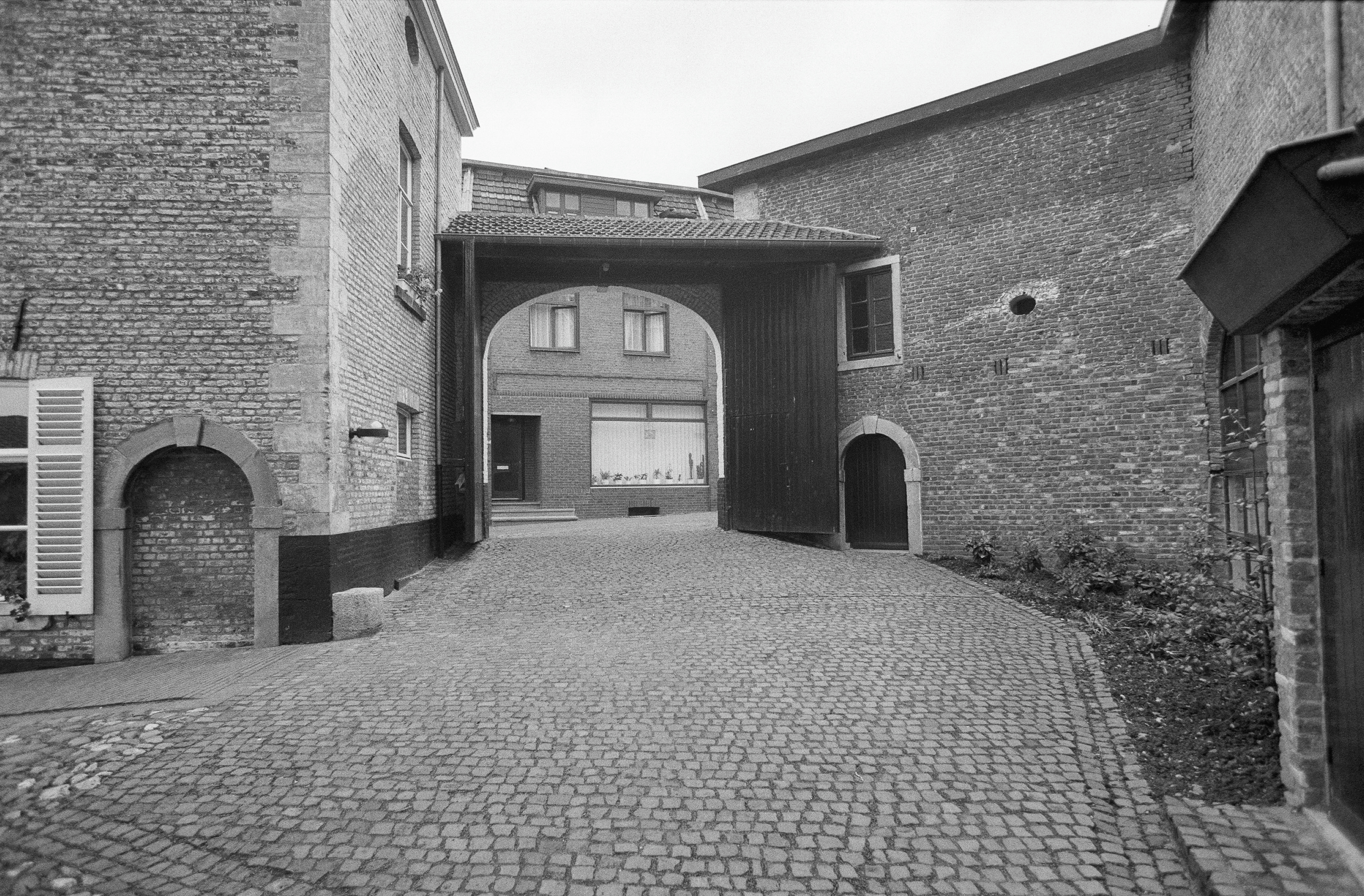 Voormalig Proosdij Complex: Exterieur INRIJPOORT